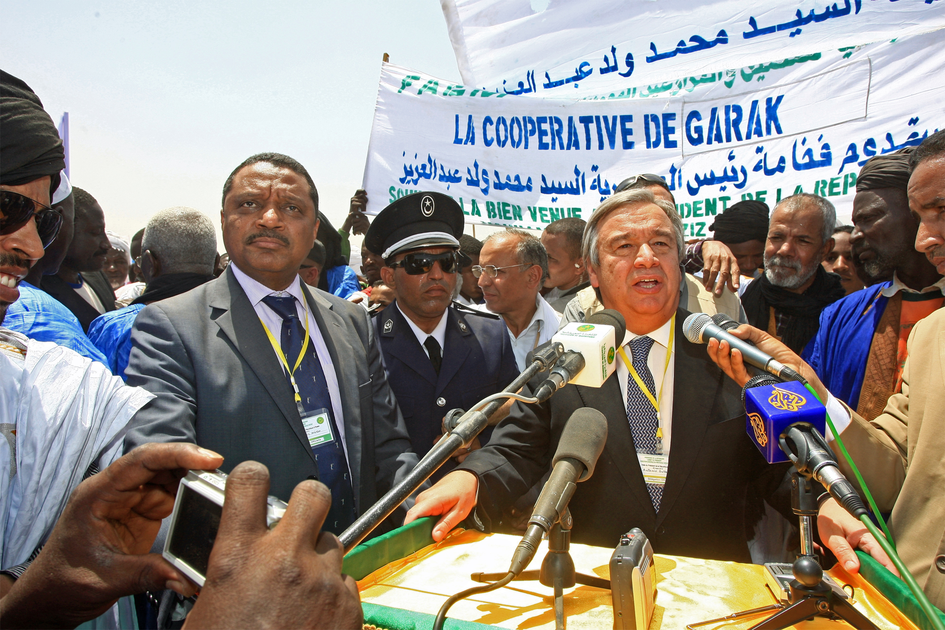 UN High Commissioner for Refugees António Guterres said that more than 24,000 Mauritanians had returned home from Senegal. المفوض الأممي السامي للاجئين أنطونيو غيترس يقول إن أزيد من 24 ألف موريتاني عادوا إلى السنغال. António Guterres, Haut commissaire des Nations unies pour les réfugiés, a déclaré que plus de 24 000 Mauritaniens étaient rentrés du Sénégal.